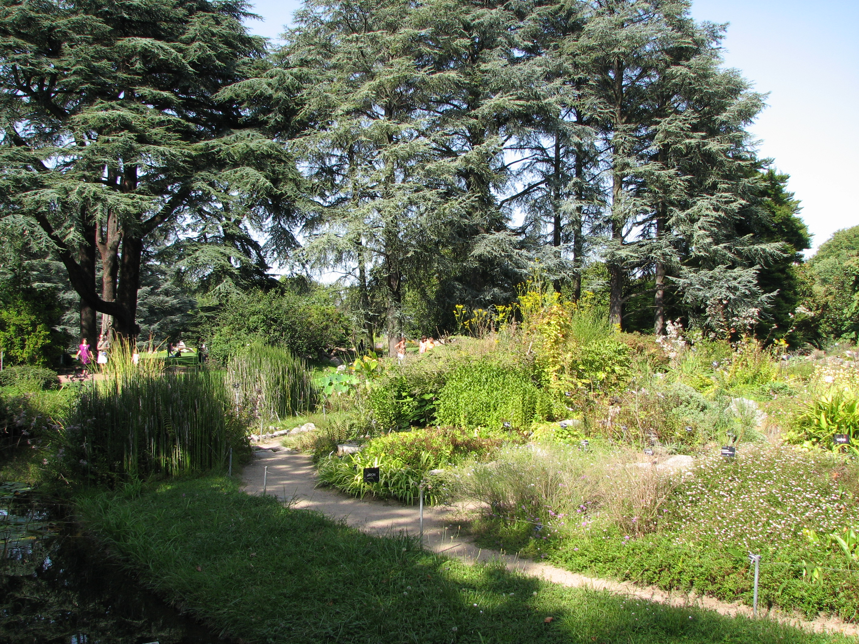 Jardin alpin dans le Parc de la Tête d'Or à Lyon (France)